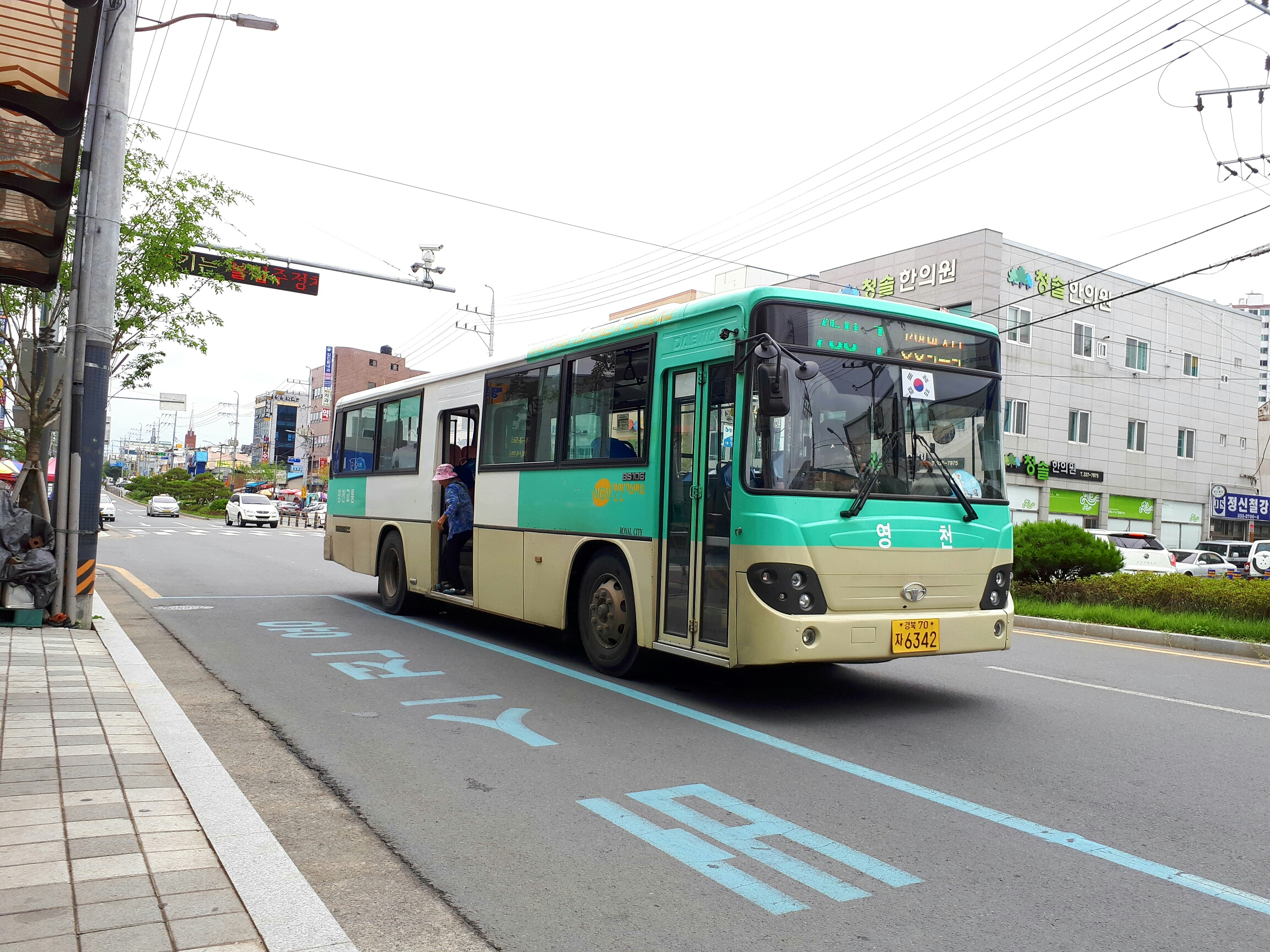 영천시내버스 750-1번